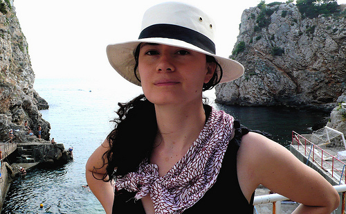 Lina Dorado in Dubrovnik Croatia